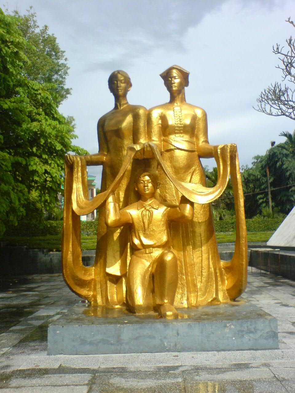 A statue in Dien Bien Phu city, Vietnam.